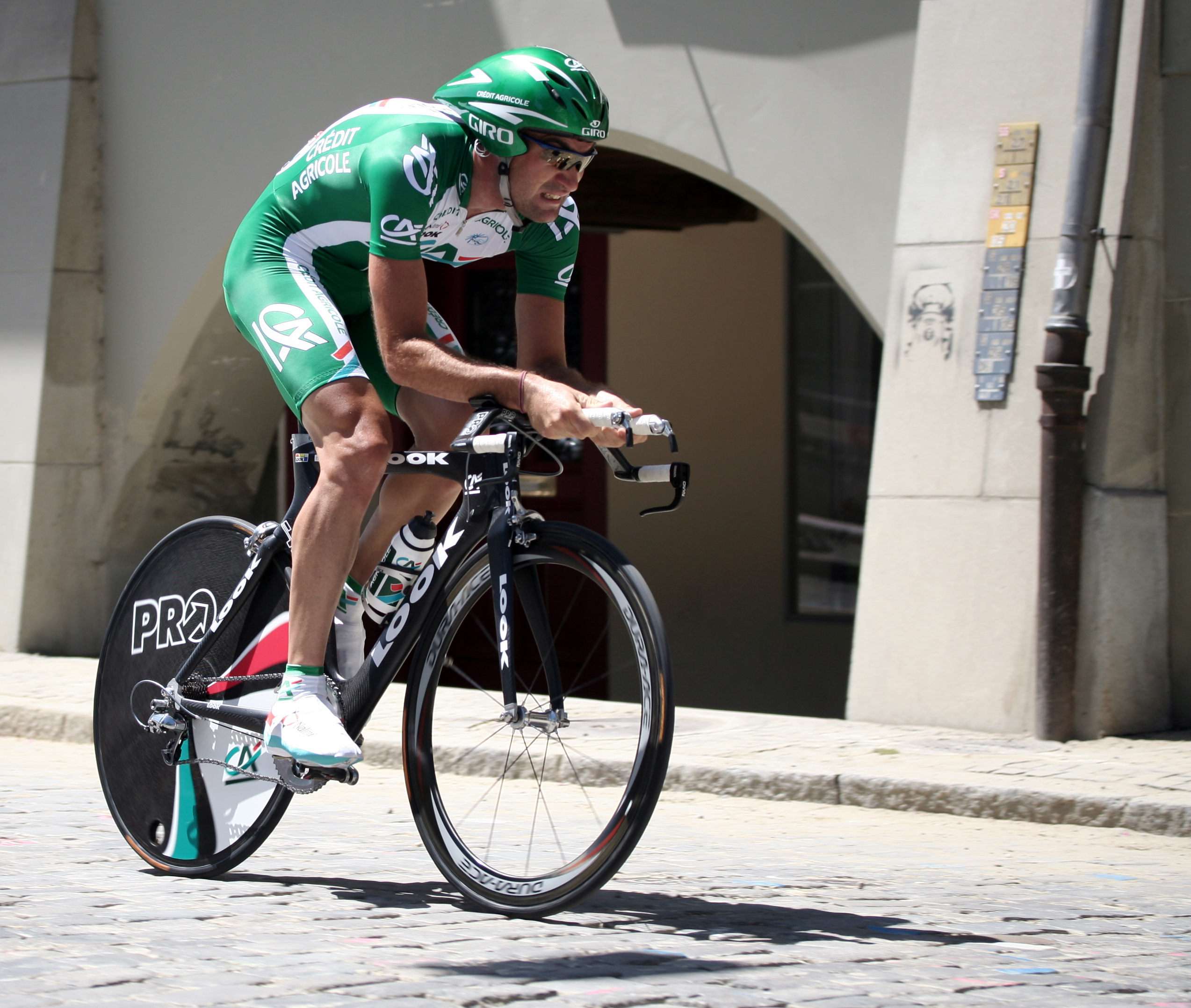 Christophe Laurent, Bern, Switzerland (Einzelzeitfahren Tour de Suisse 2007)